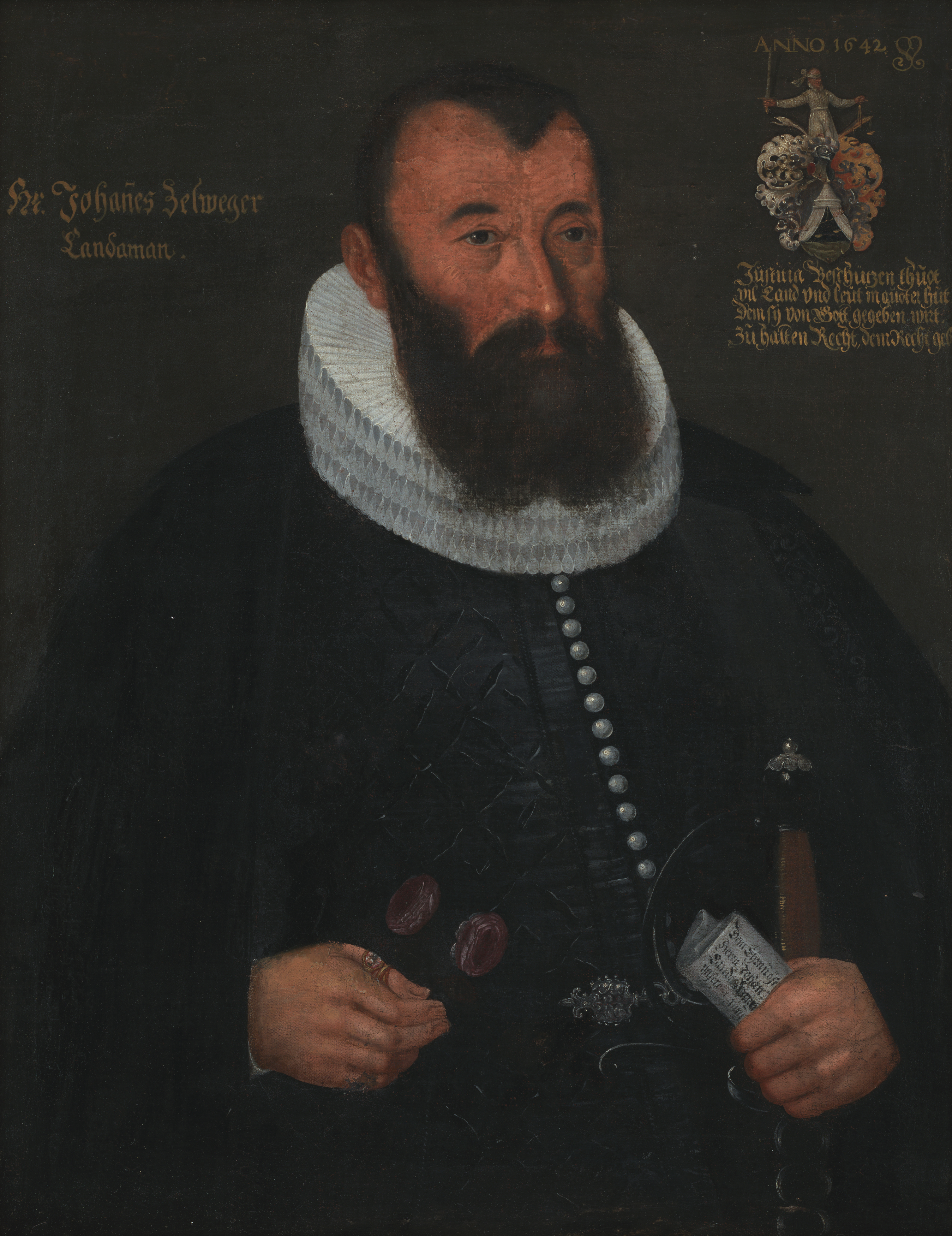 7. Landammann von Appenzell Ausserrhoden, Brustbildnis